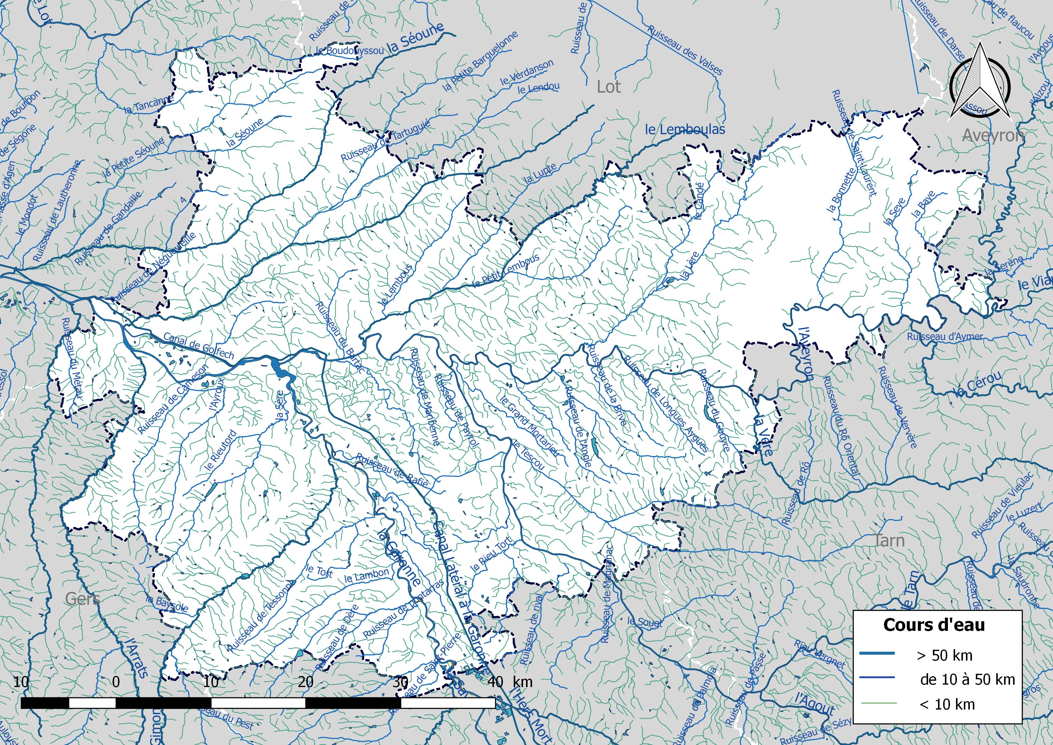 Réseau hydrographique du département de Tarn-et-Garonne (France).